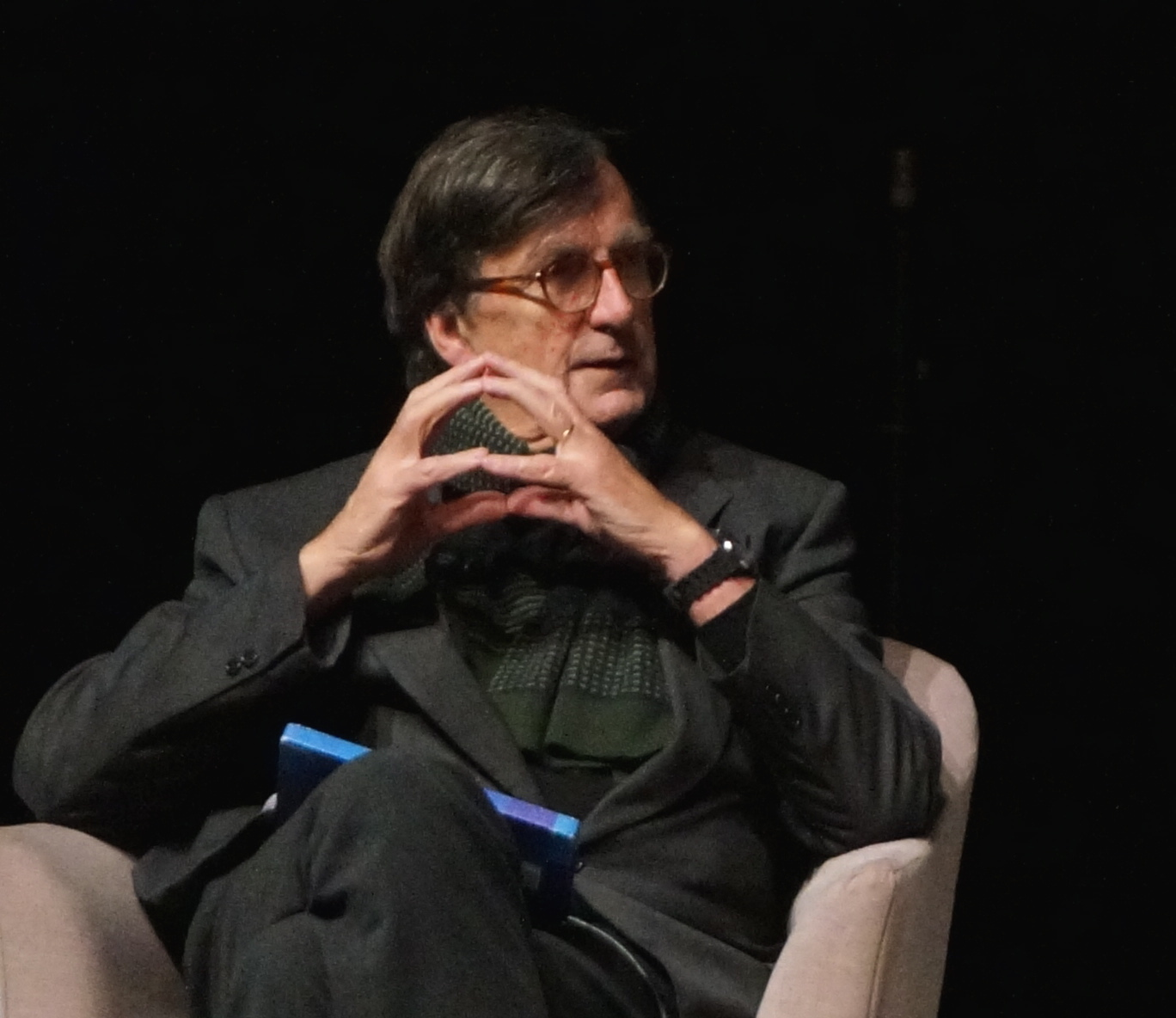 lors de "reims scènes d'Europe", Agent de la géohistoire.